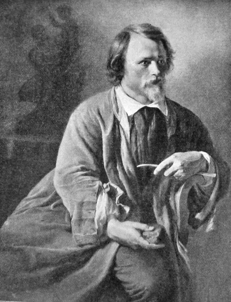 Jens Adolf Jerichau, fulde navn Emil Jens Baumann Adolf Jerichau, (født den 17. april 1816 i Assens – død 24. august 1883 i Neder Dråby ved Jægerspris) var billedhugger.